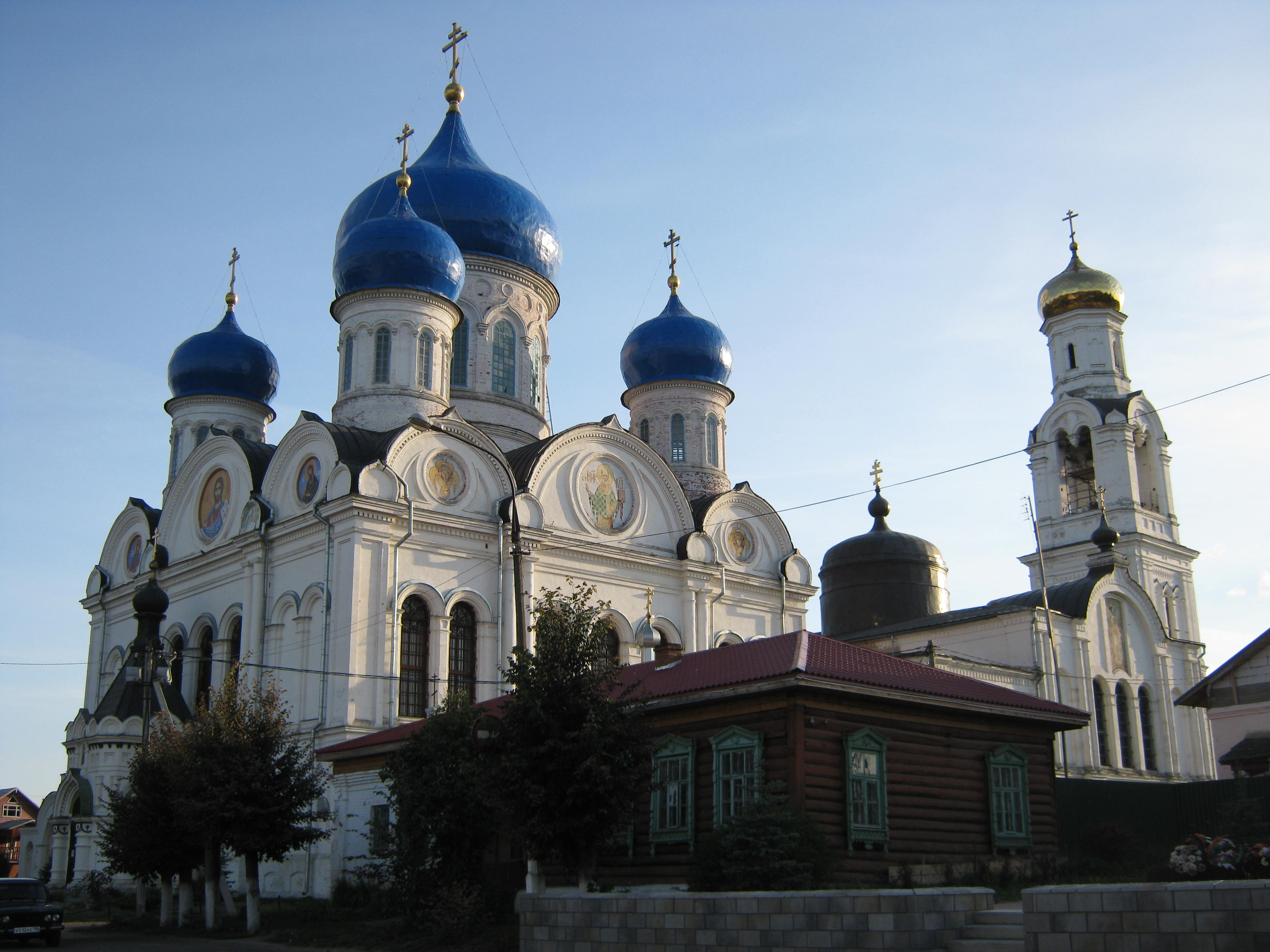 Церковь Николая Чудотворца в Рогачёво (Московская область)